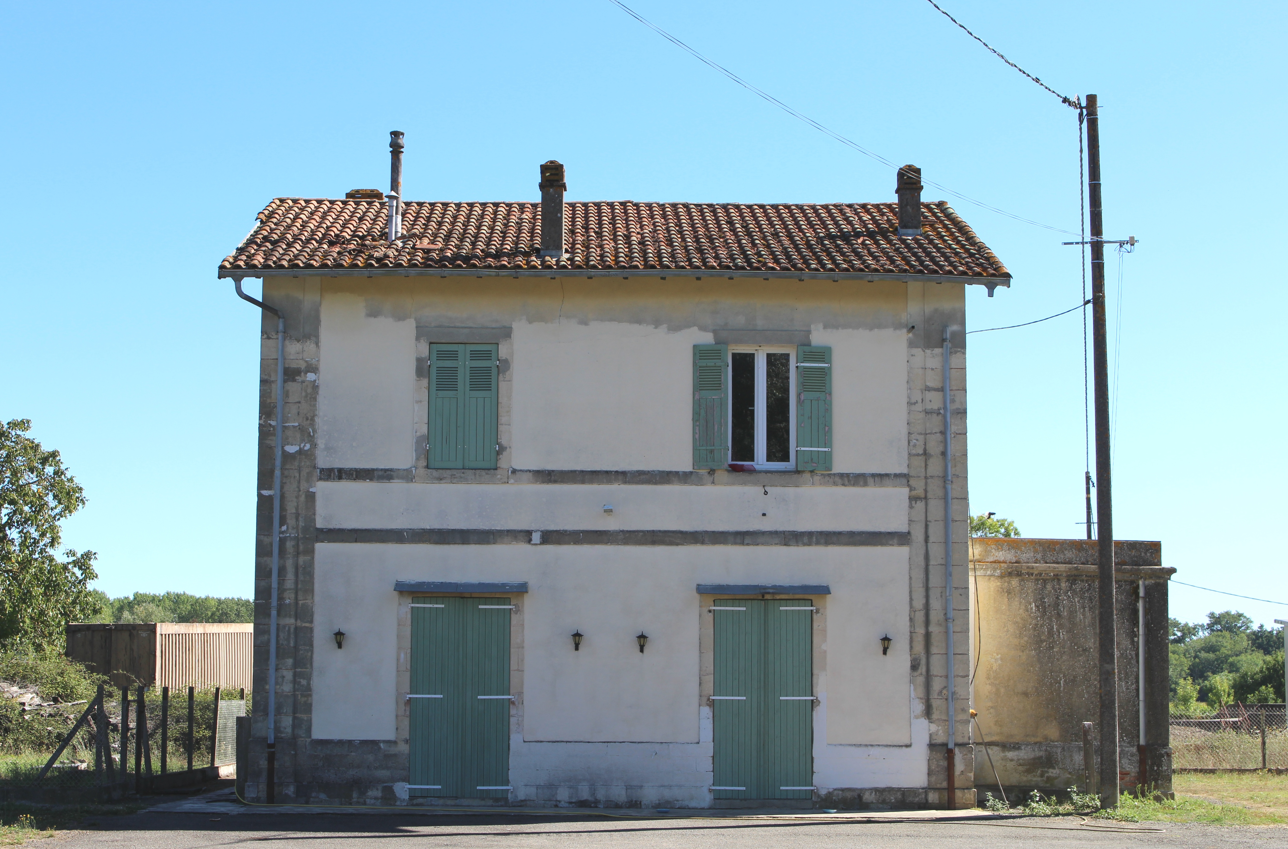 Gare de Caussade-Rivière (Hautes-Pyrénées)